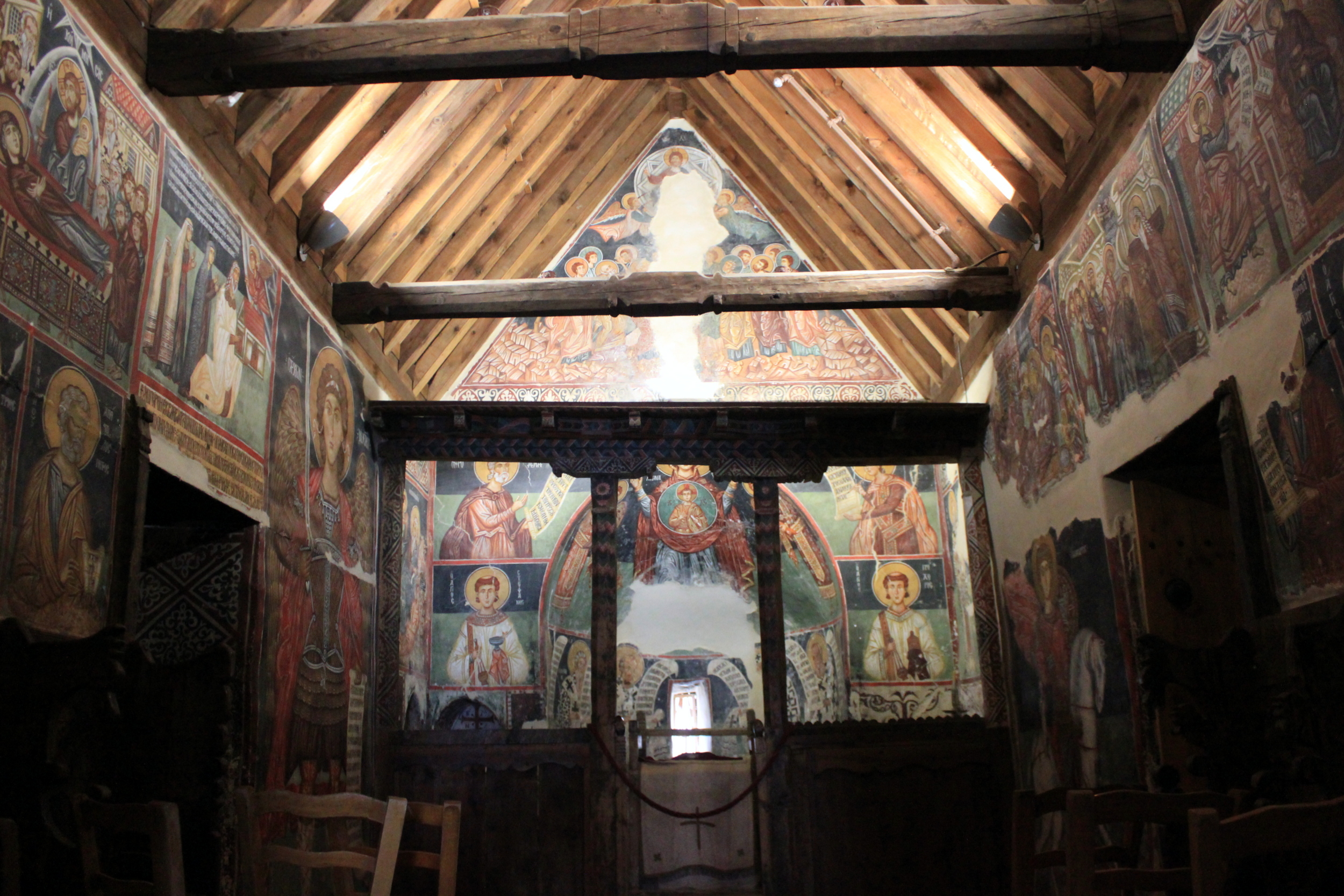 Die Scheunendachkirche des Erzengels Michael in Pedoulas, Zypern.